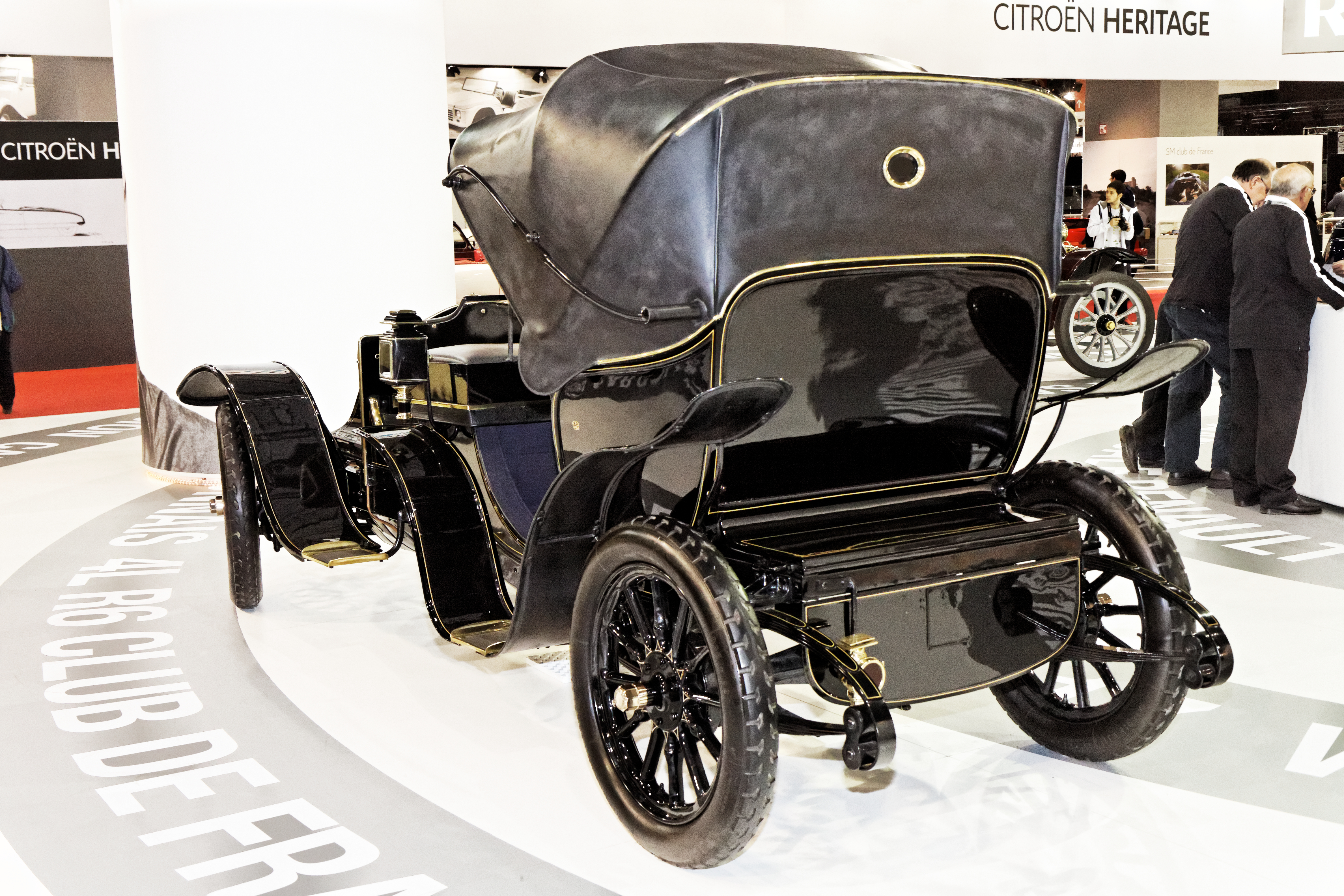 Une Renault type DG Victoria Rotschild présentée lors du salon Retromobile 2013.